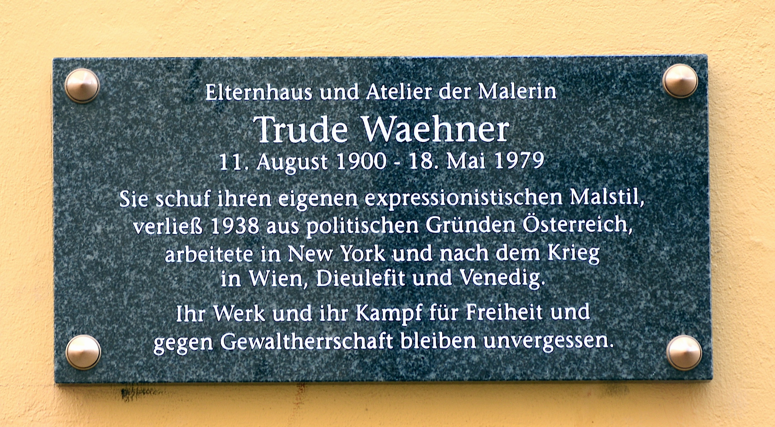 Gedenktafel für Trude Waehner in Wien-Josefstadt am Haus Buchfeldgasse 6